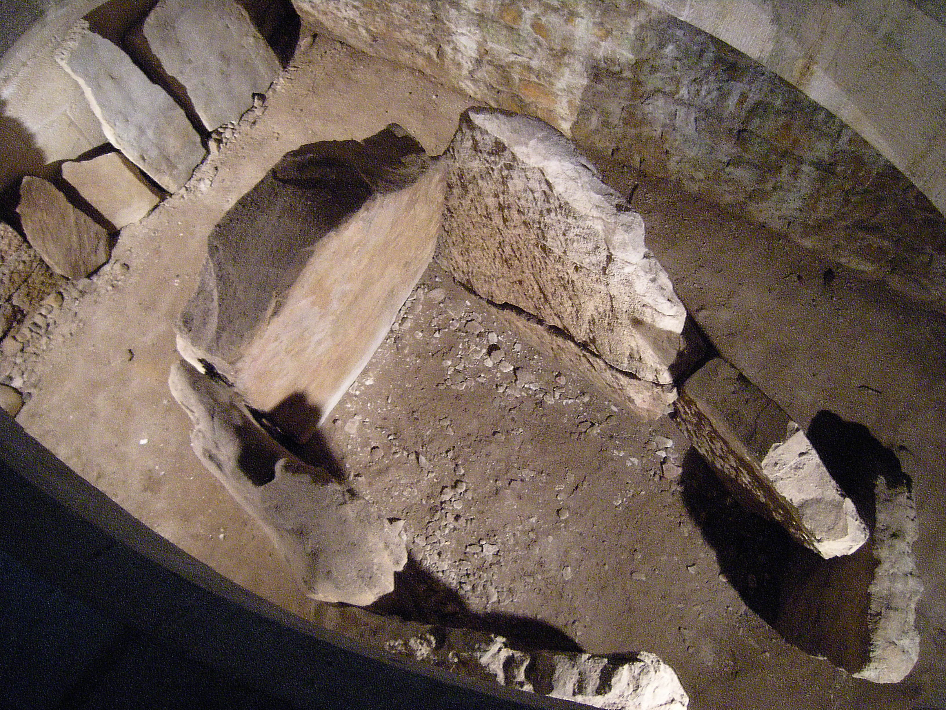 Dolmen situado en la planta inferior de la iglesia. Dolmen de Santa Cruz Esta foto participó en el juego En otro lugar de Flickr.